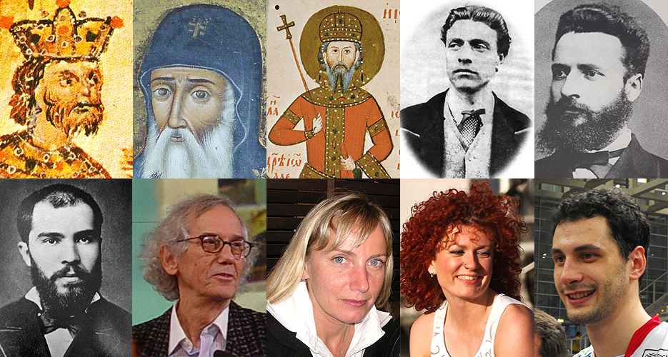 Krum, John of Rila, Ivan Alexander, Vasil Levski, Hristo Botev, Stefan Stambolov, Christo, Elena Yoncheva, Ludmilla Diakovska, Matey Kaziyski